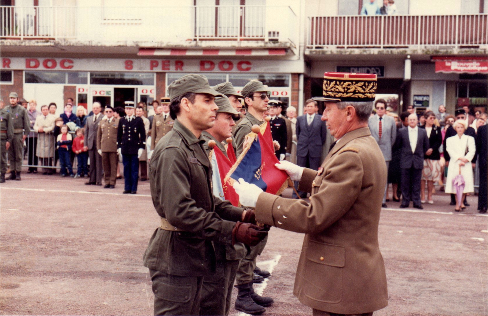 Remise des fanions aux commandants des compagnies du 32e RID à Ballan-Miré (Indre-et-Loire) le 24 mai 1984. Ici, le général Roth le Gentil, commandant la 13e DMT, remet le fanion de la 1ère compagnie de commandement du régiment au capitaine ORSEM Alain Darles. L'ancien chef de corps du 32e, le colonel Daniel, est présent en arrière plan à gauche, en béret, à coté d'un détachement de réservistes du 32° RID (extrême gauche)